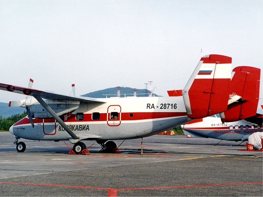 Koryak Air Enterprise Antonov An-28